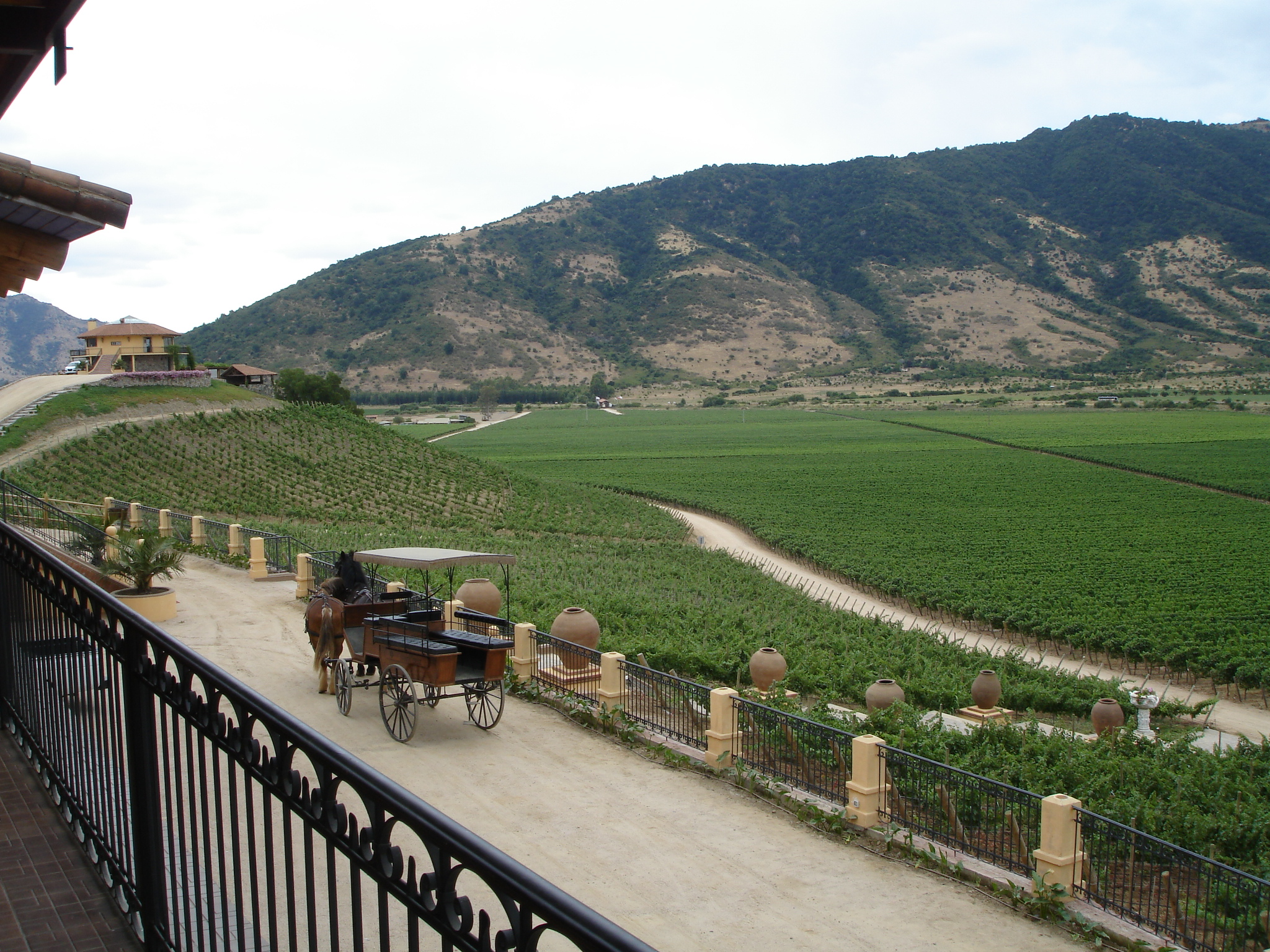 la viña de cardoen